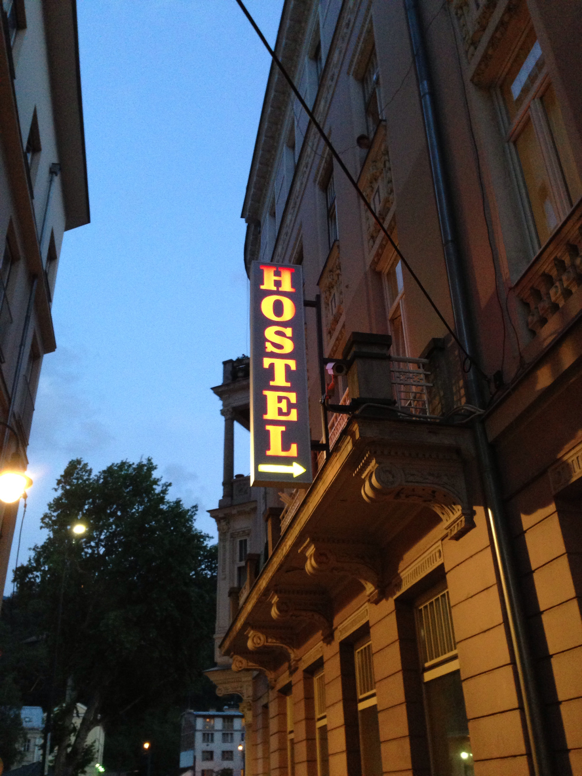 GCERC - Sarajevo hostel